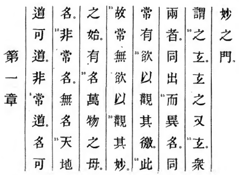 Tao Te King, traduction Stanislas Julien, 1842, chapitre 01. Planche du texte établi par le traducteur.